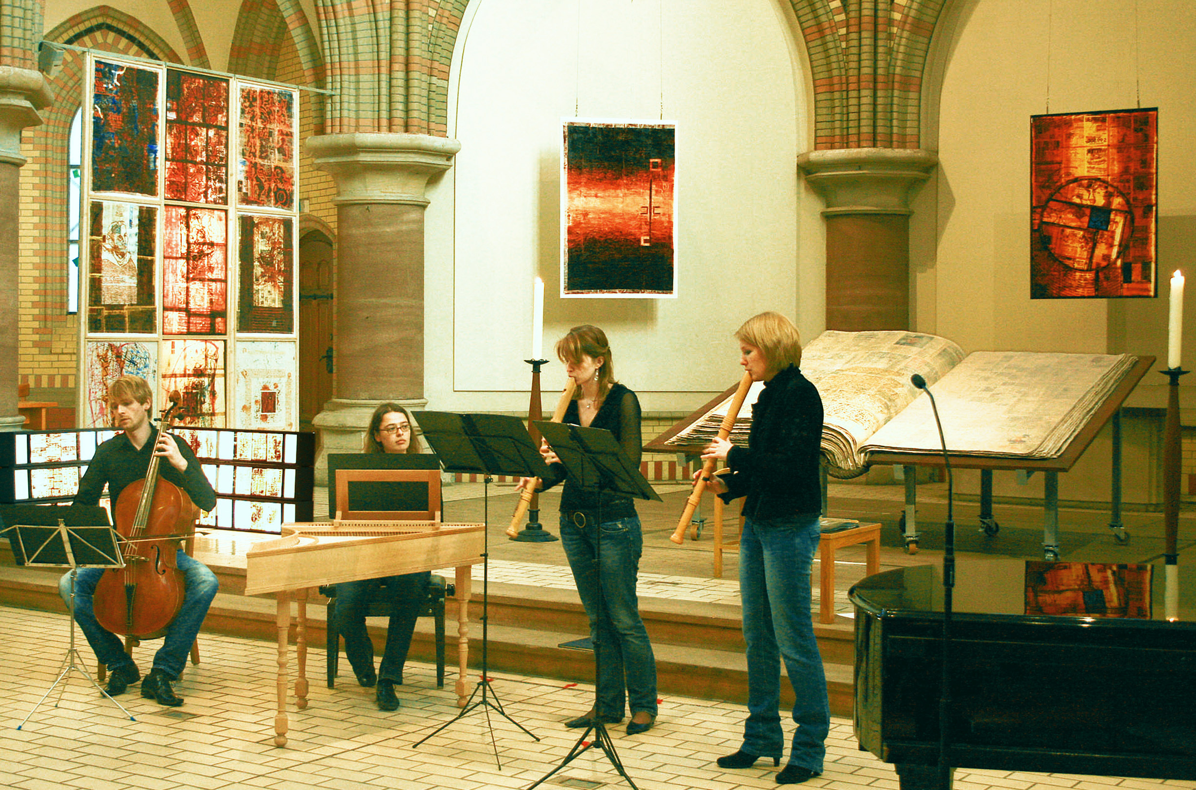 2009 - Ausstellungsansicht mit Barockensemble Altona-Ost, Fotografie von Dieter Gerschler